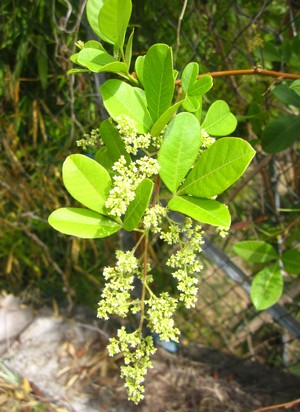 Rhus longipes